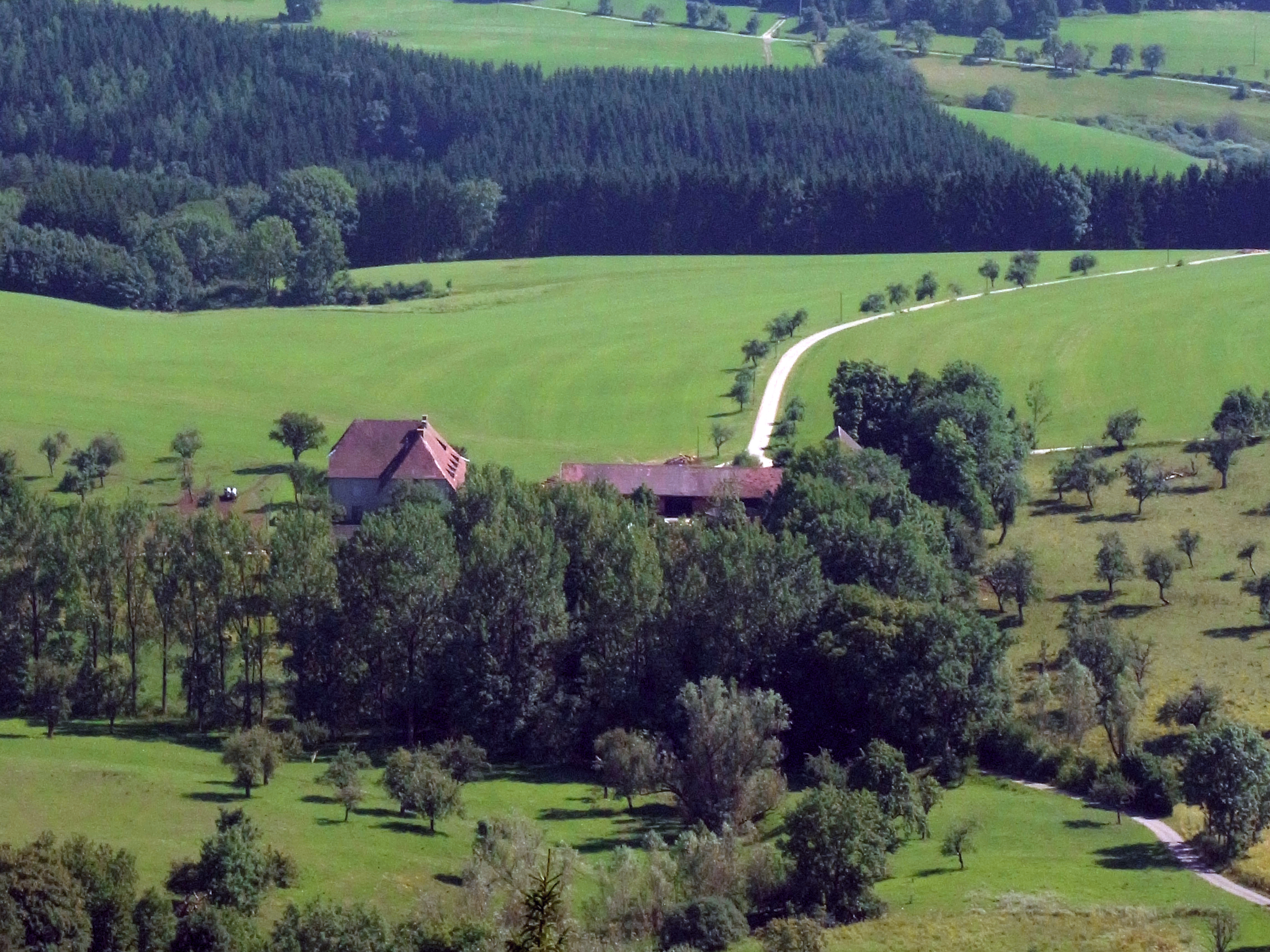 Hausen am Tann: Gut Oberhausen vom Wenzelstein aus gesehen